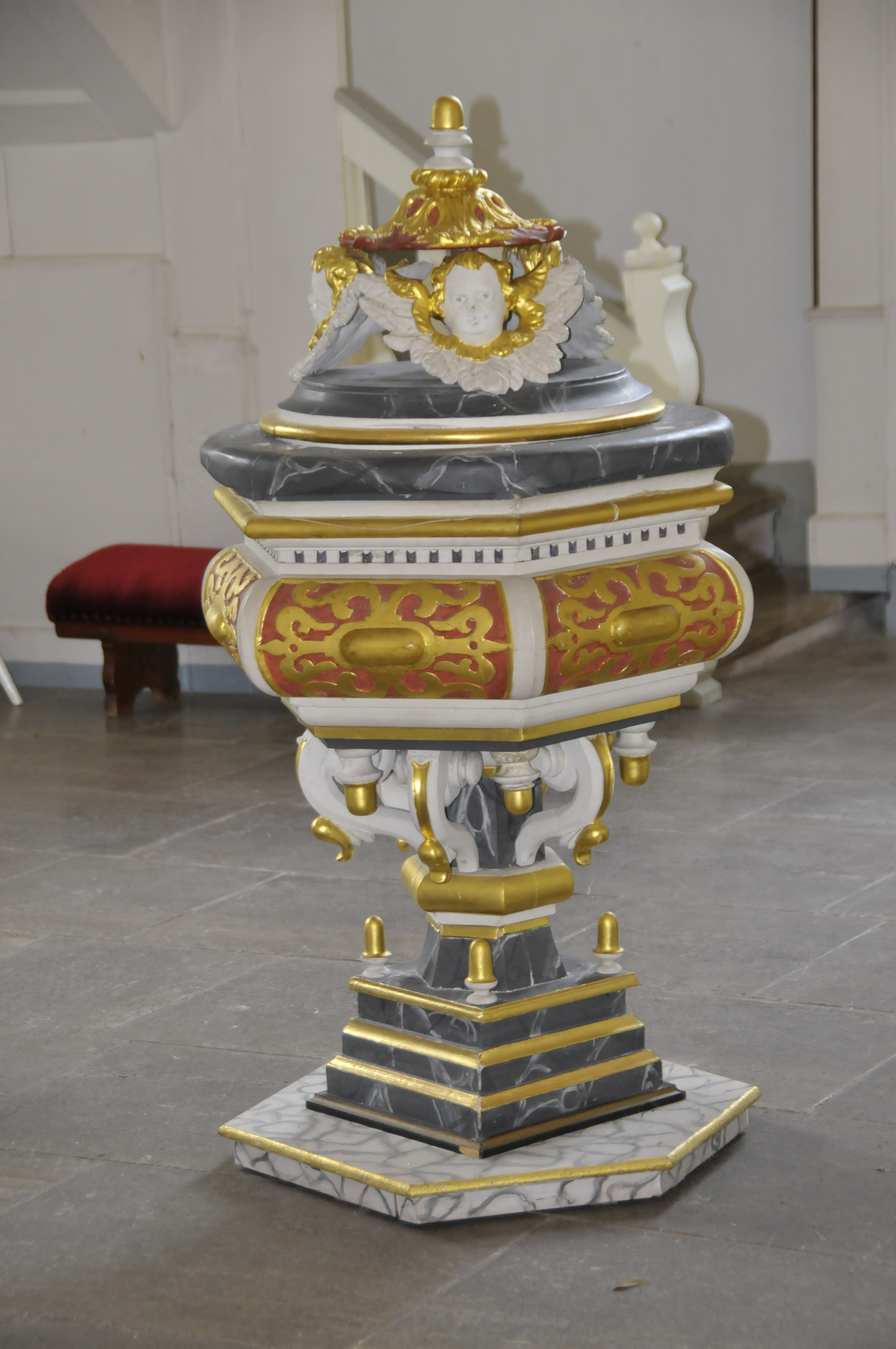 Finsterbergen, Kirche, Taufbecken